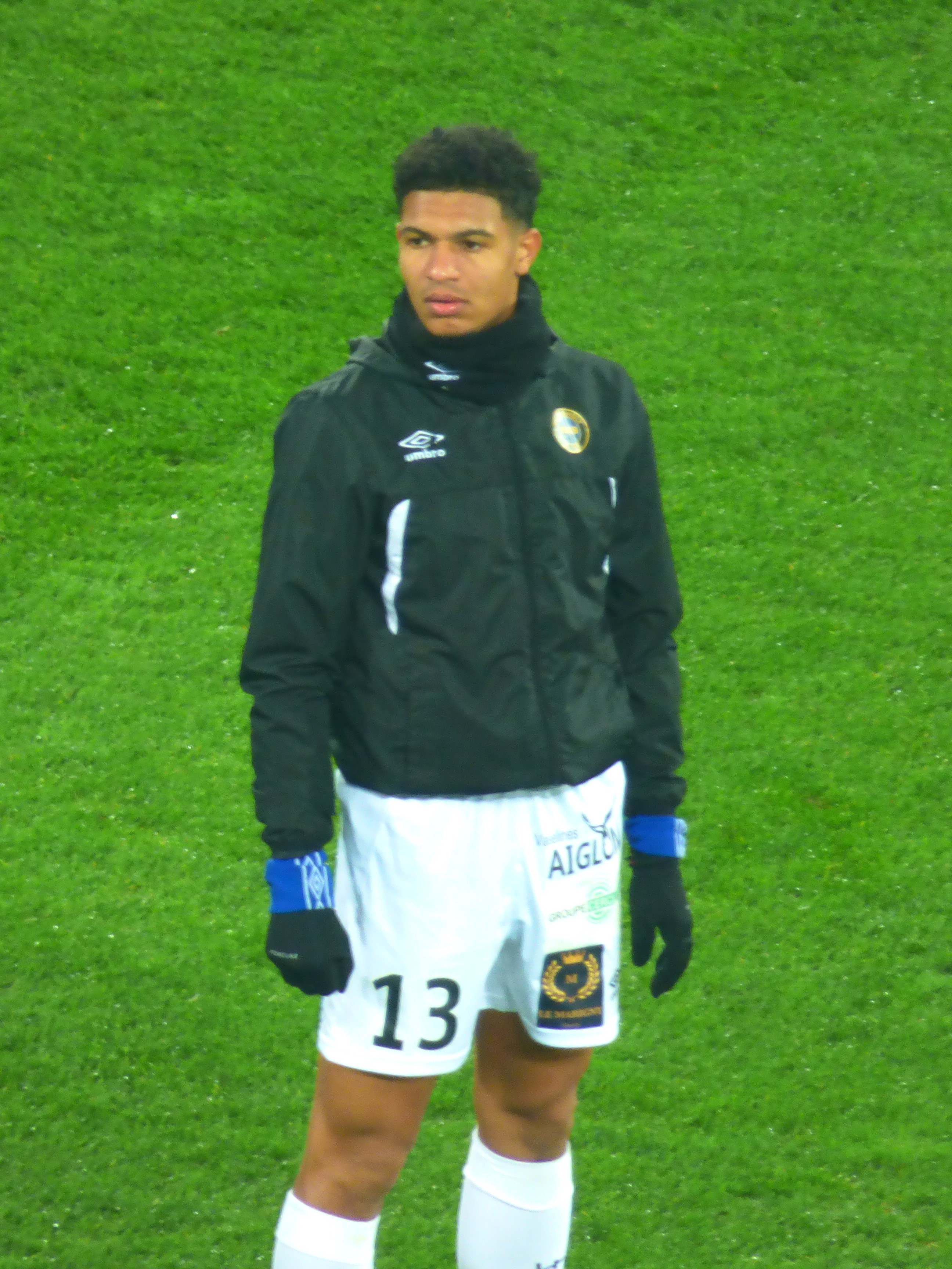 Florian David avant le match Lens - Chambly, comptant pour la dix-septième journée du championnat de France de football de Ligue 2 2019-2020, le 3 décembre 2019.